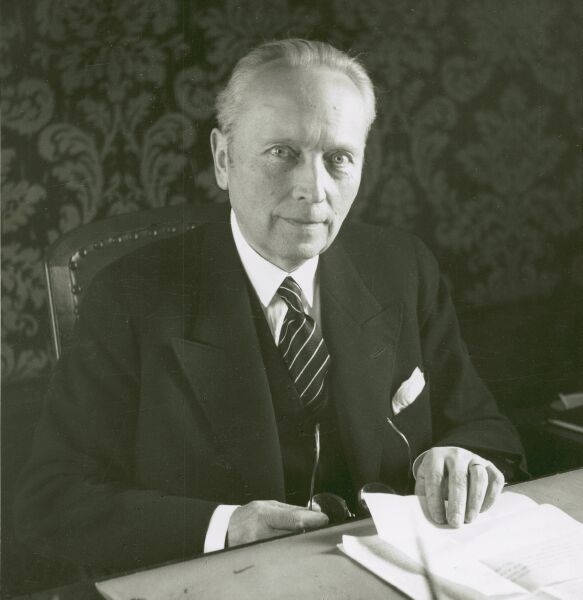 Porträt von Arthur Rohn